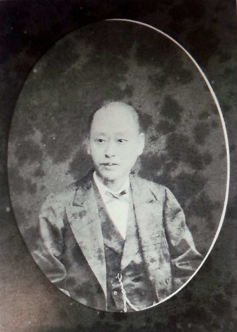 園池公静の肖像写真。